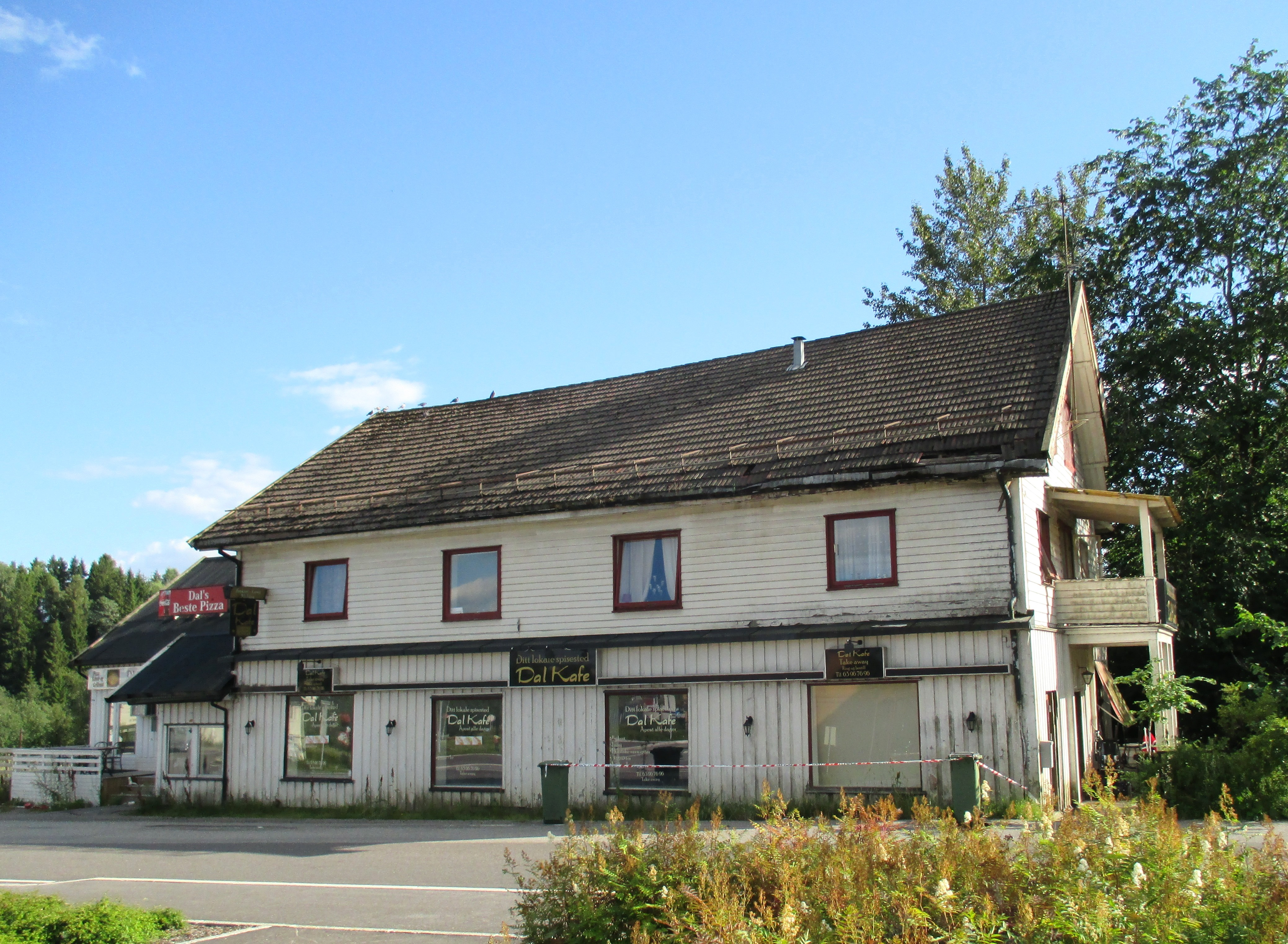 Kafé på Dal i Eidsvoll